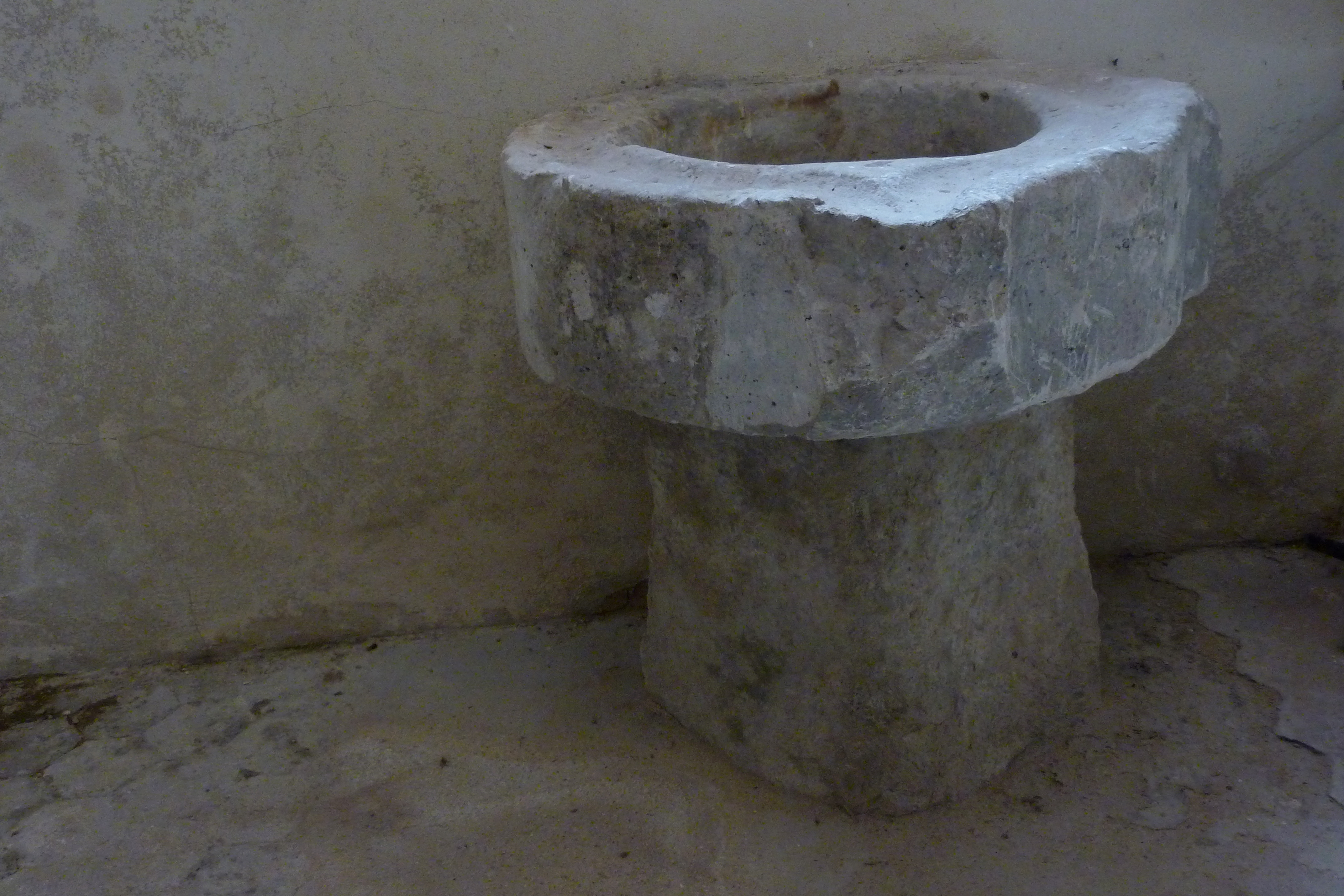 Katholische Kirche Saint-Sulpice in La Celle-sur-Morin im Département Seine-et-Marne in der Region Île-de-France (Frankreich), Lavabo aus dem 11. Jahrhundert vom Kreuzgang des ehemaligen Priorats in La Celle